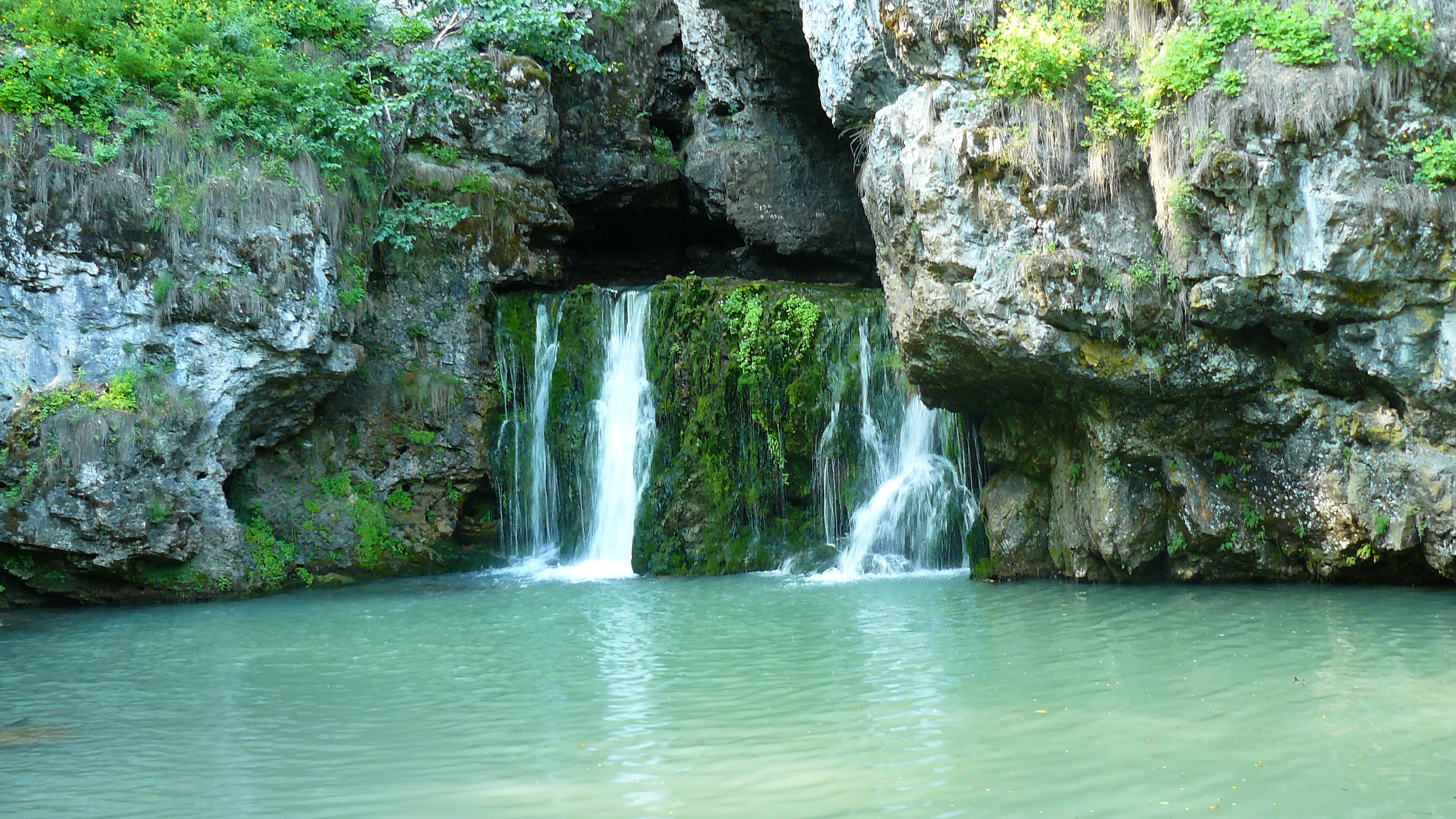 Водопад Атыш: Белорецкий район, Башкортостан This image is related to the protected area of Russia number 0210057